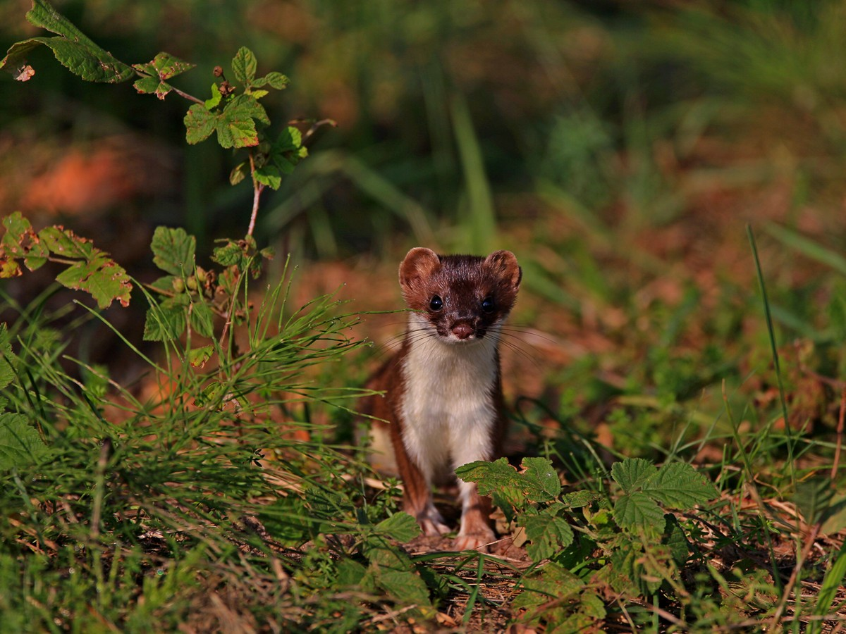 Wiesel in Kieve